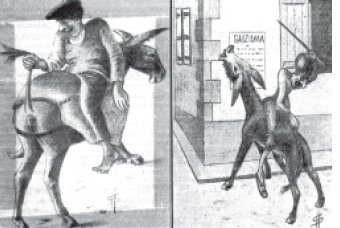 Astolasterra